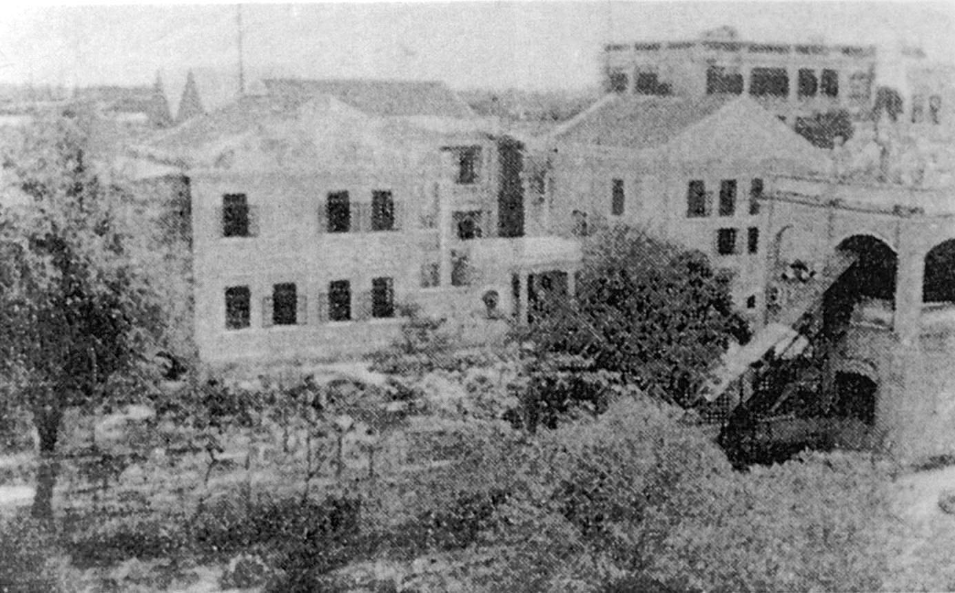 大沙頭飛行場の広東航空学校2代目校舎